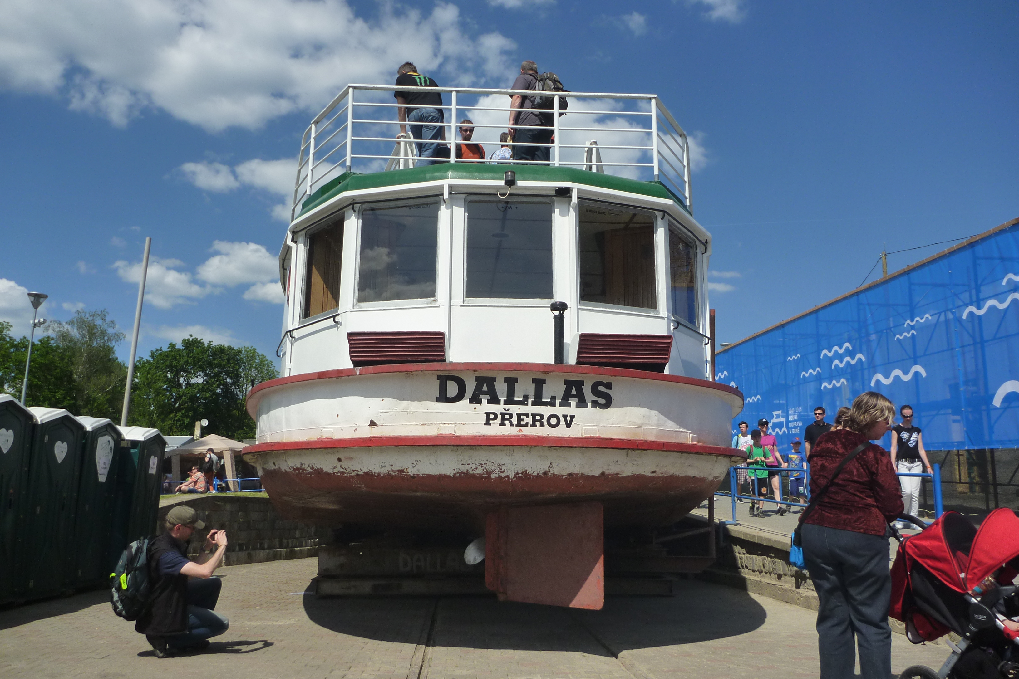 Loď Dallas vytažená na břeh v areálu LD